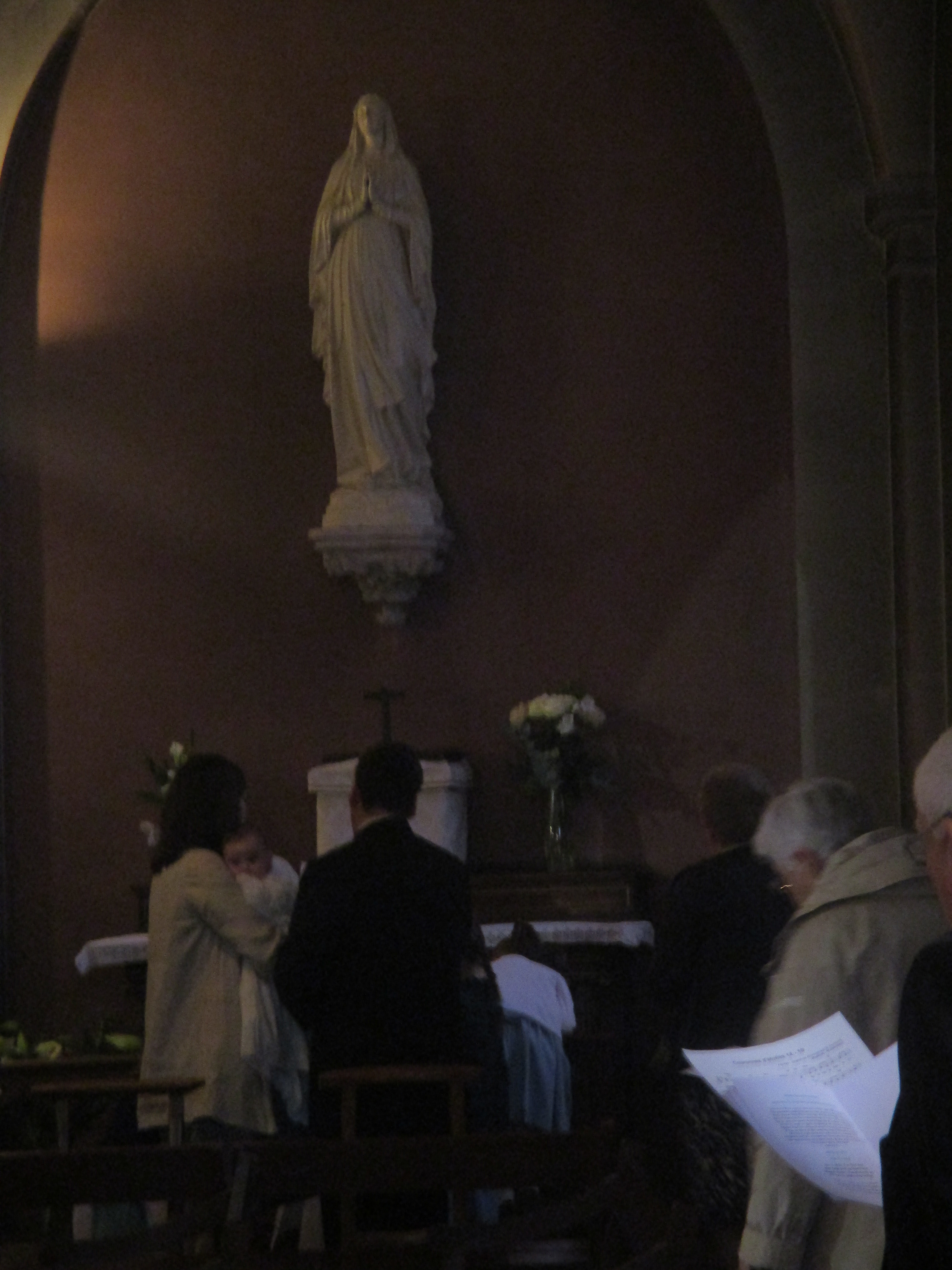 Consécration à la Vierge à la chapelle de la Vierge de l'église Sainte-Geneviève d'Asnières.